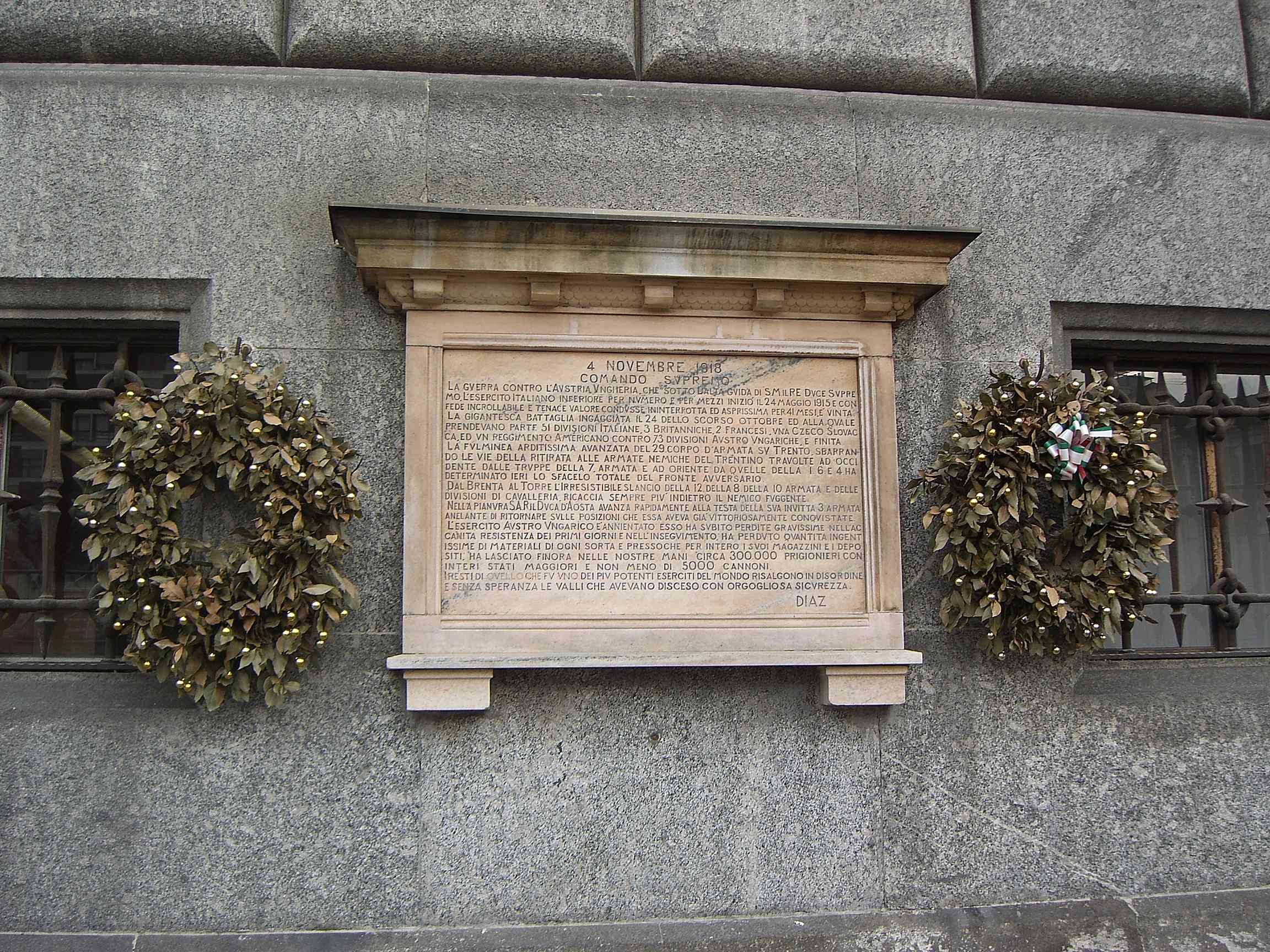 Monza Lapide commemorativa del Bollettino della Vittoria 4 novembre 1918 Generale Armando Diaz - Palazzo del Comune di Monza